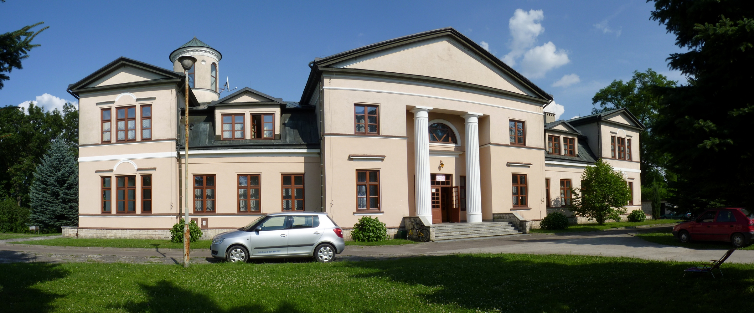 Nozdrzec - Pałac Skrzyńskich ( widok od frontu )